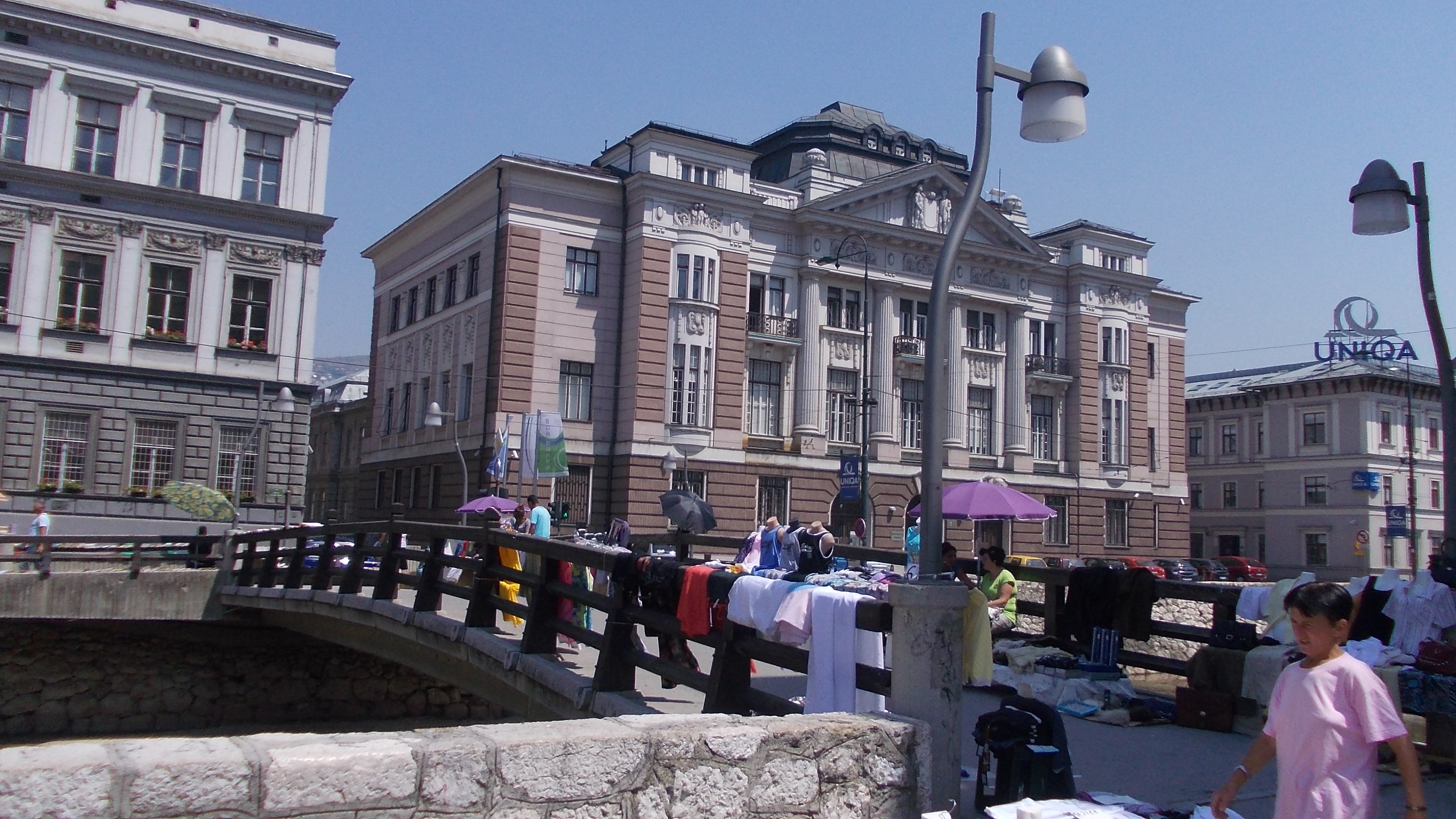 Сарајево: мост Дрвенија